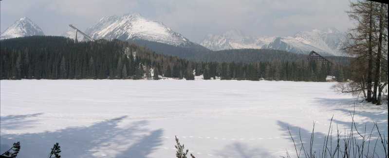 Panorama Strbske Pleso